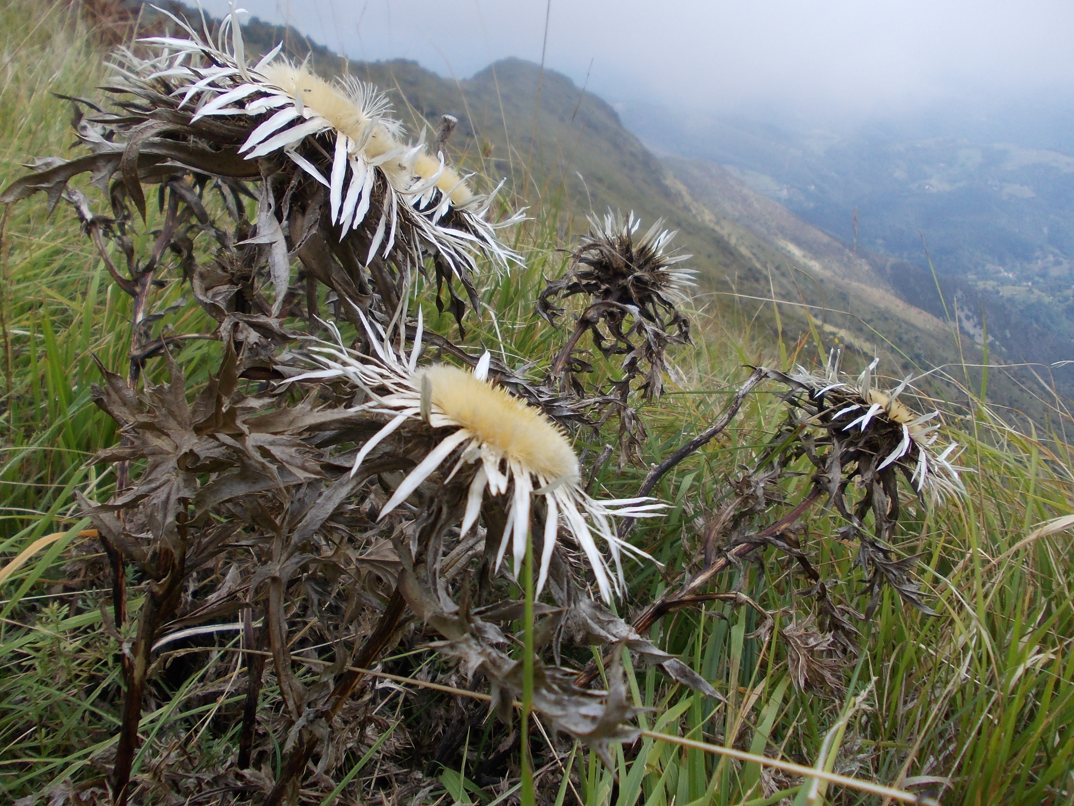 Carlina acaulis sul monte Reixa sopra Arenzano